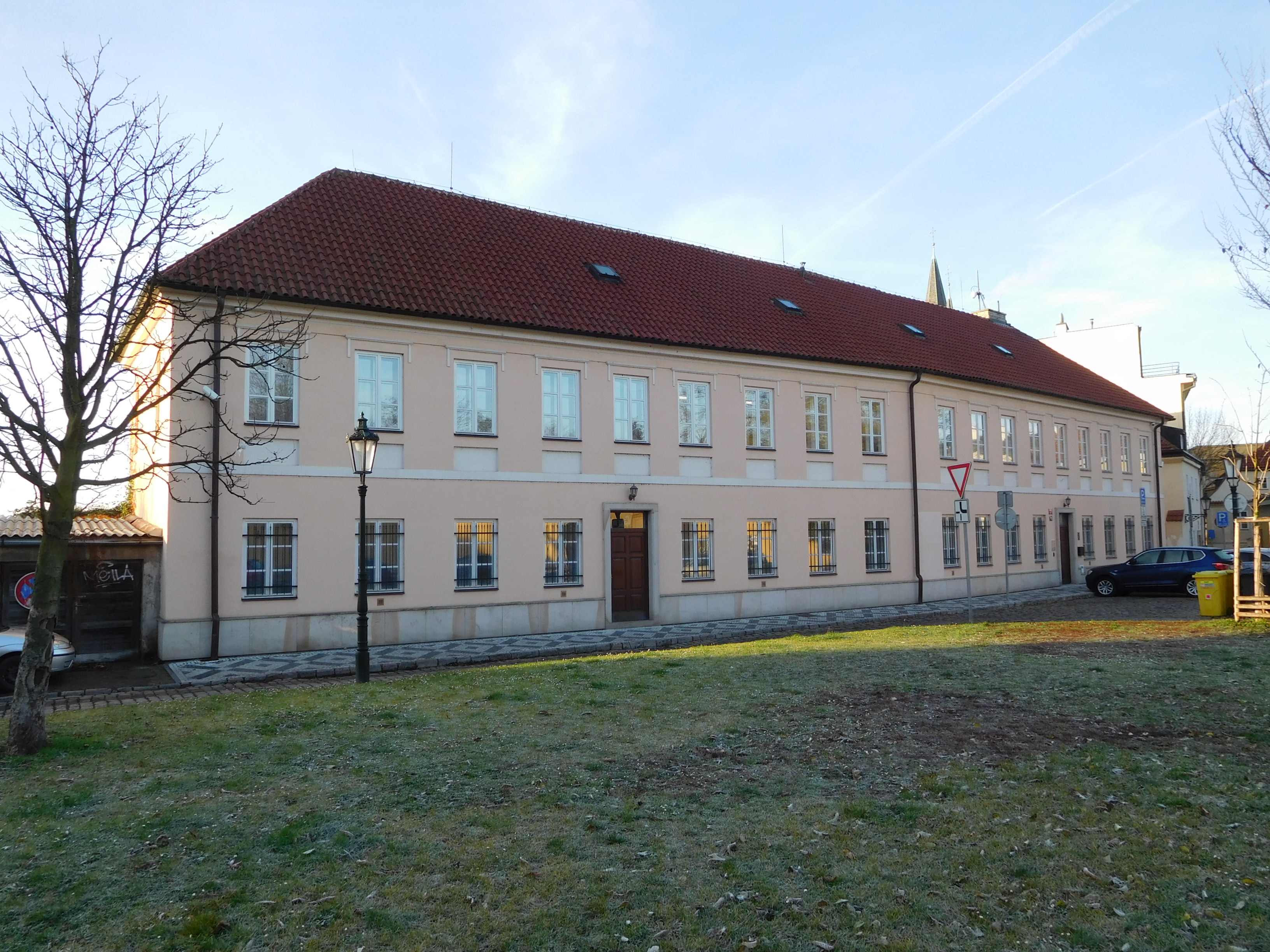 Praha - Nové Město, Apolinářská 12 a 14, sídlo Notářské komory ČR